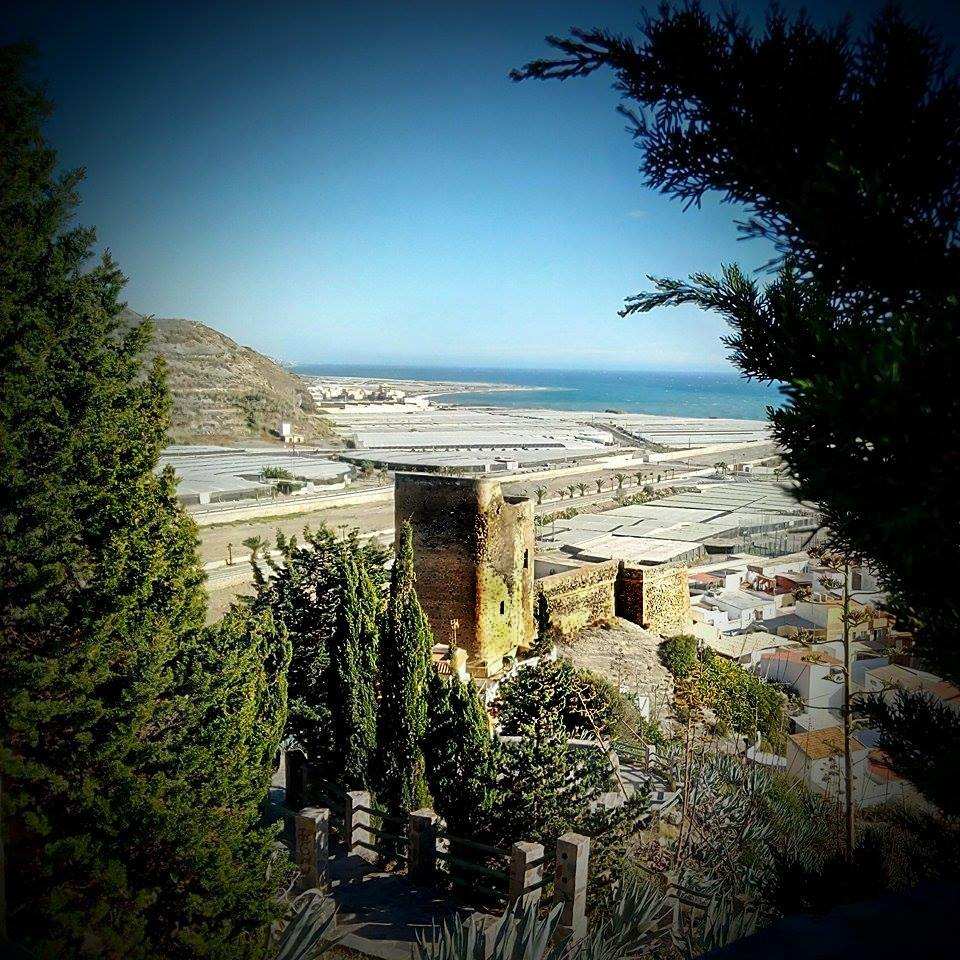 Entorno del conjunto defensivo de La Rábita